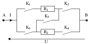 Schéma électrique d'un système de chauffage